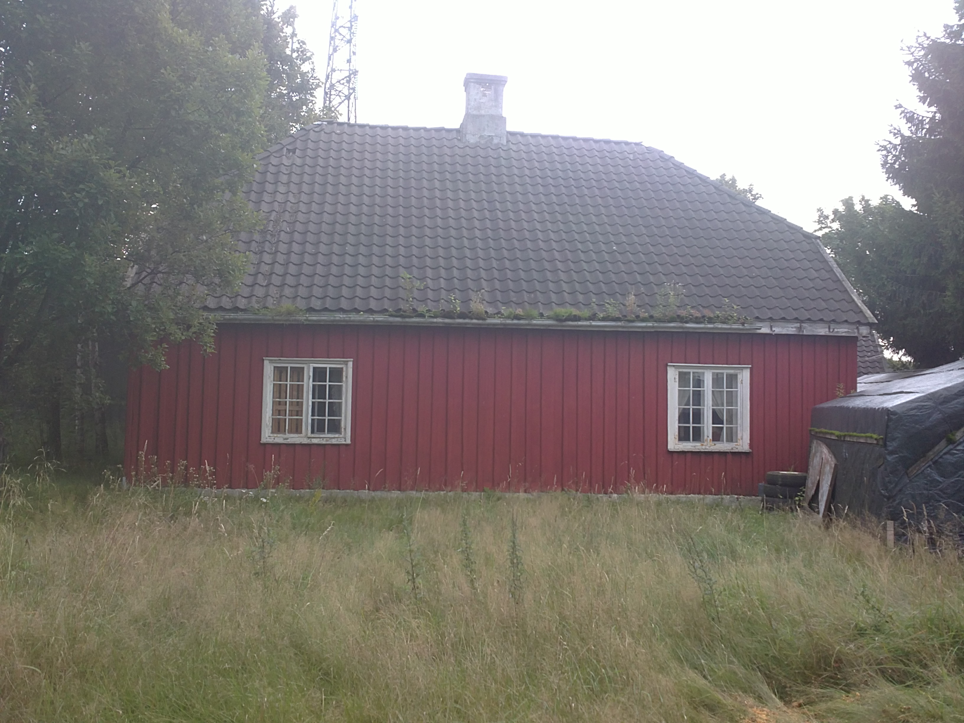 Bilde av gården Undersbo, Larvik